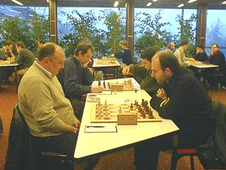 Aloyzas Kveinys - Matthew Sadler, Deutsche Schachbundesliga 2001/2002: 4. Runde am 25. November 2001 in Solingen auf TeleSchach.